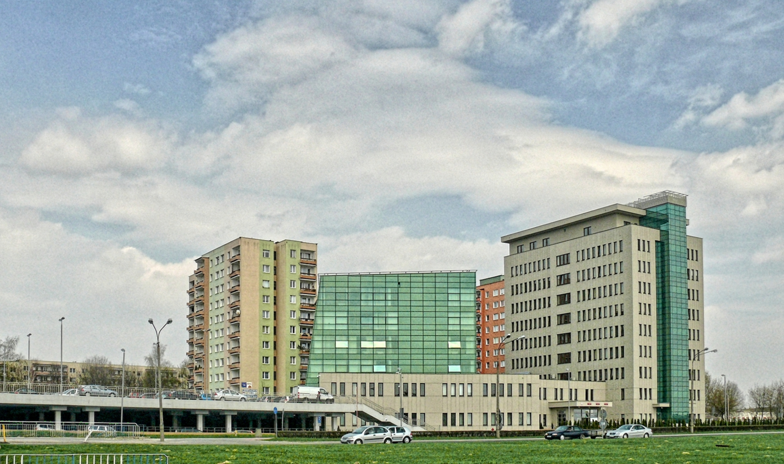 Drugi Urząd Skarbowy w Lublinie, przy ul. T. Szeligowskiego 24